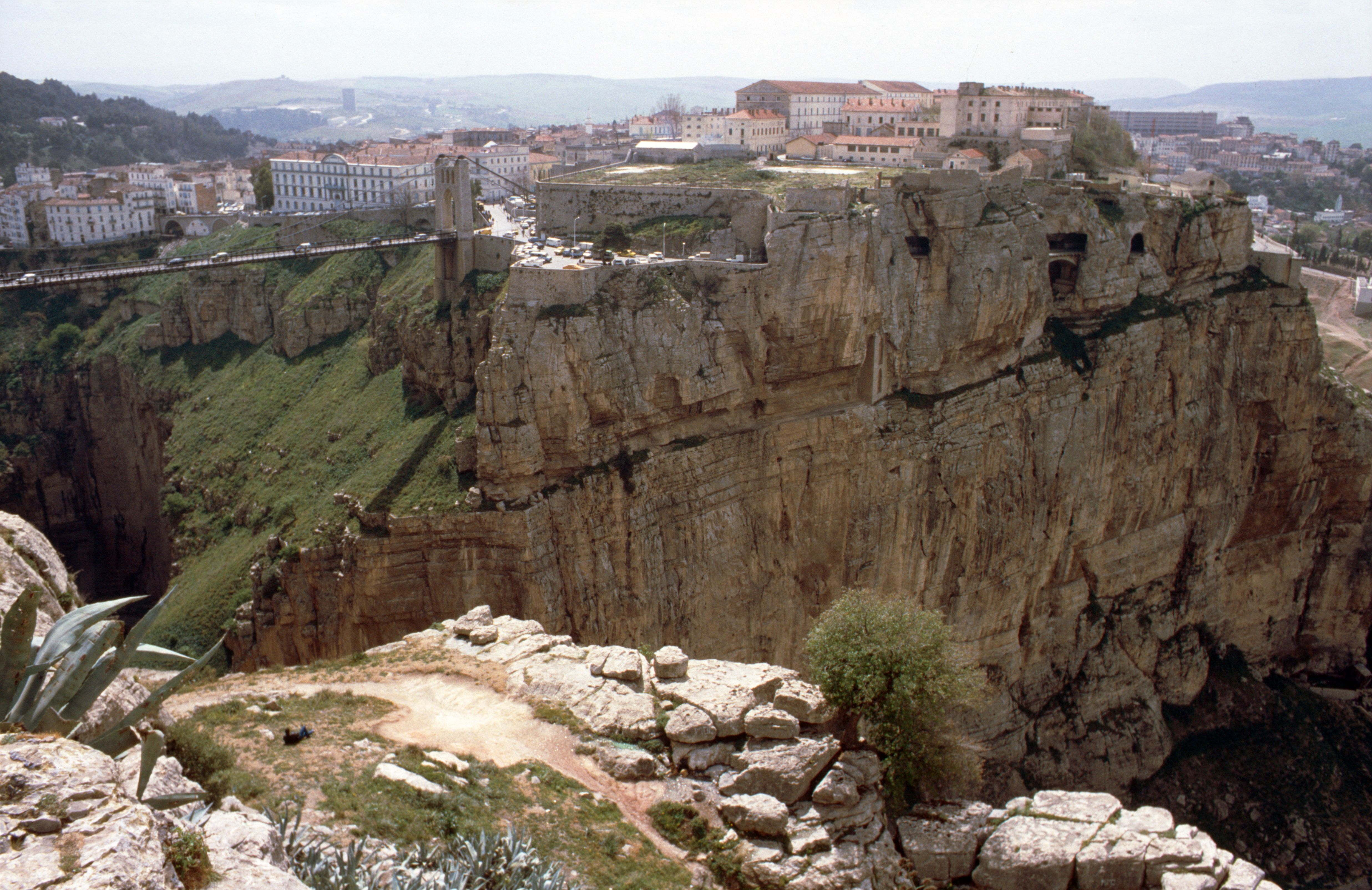 Blick auf die Altstadt von Constantine 1990